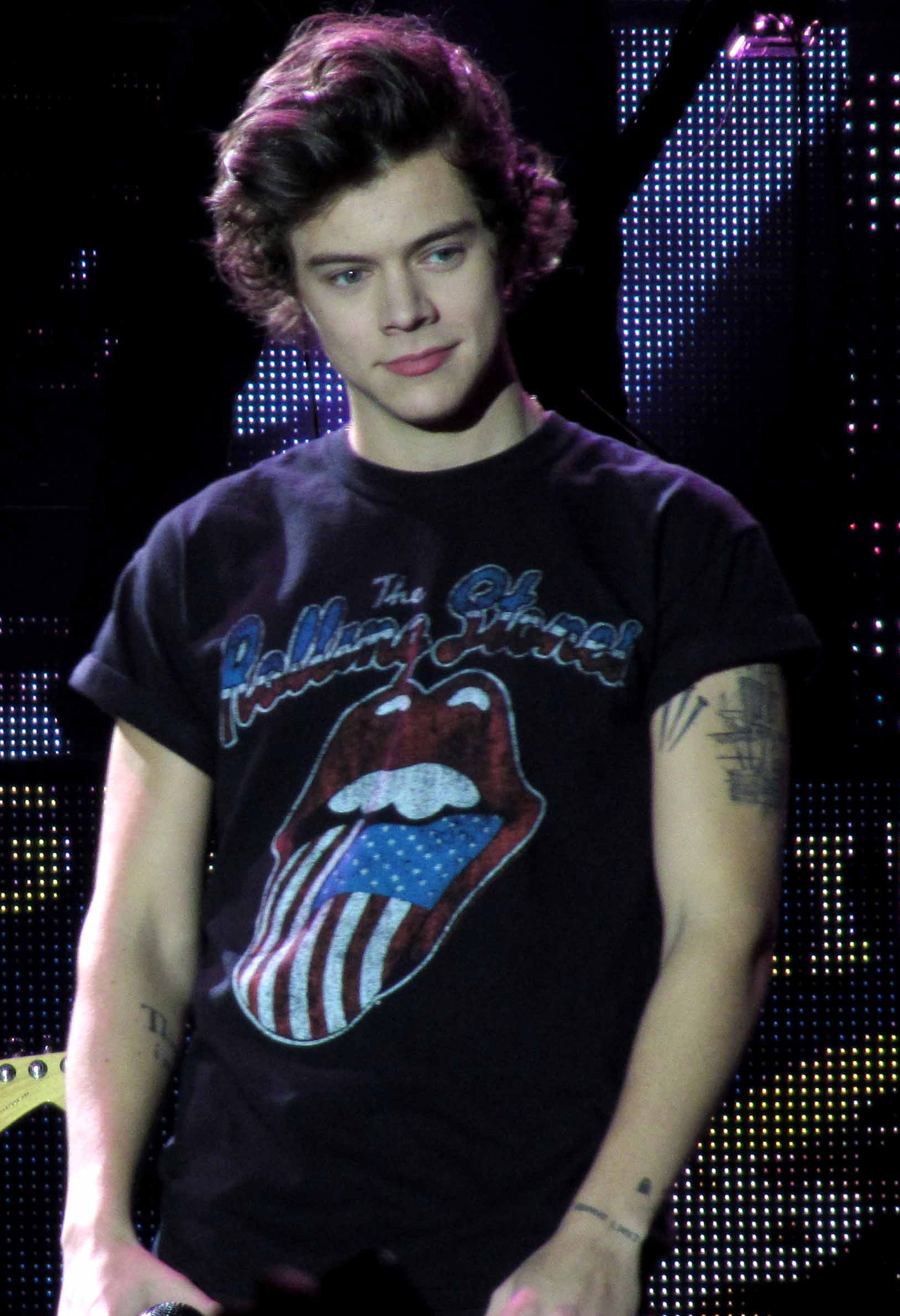 Harry Styles en el Take Me Home Tour de la SECC en Glasgow el 27 de febrero de 2013